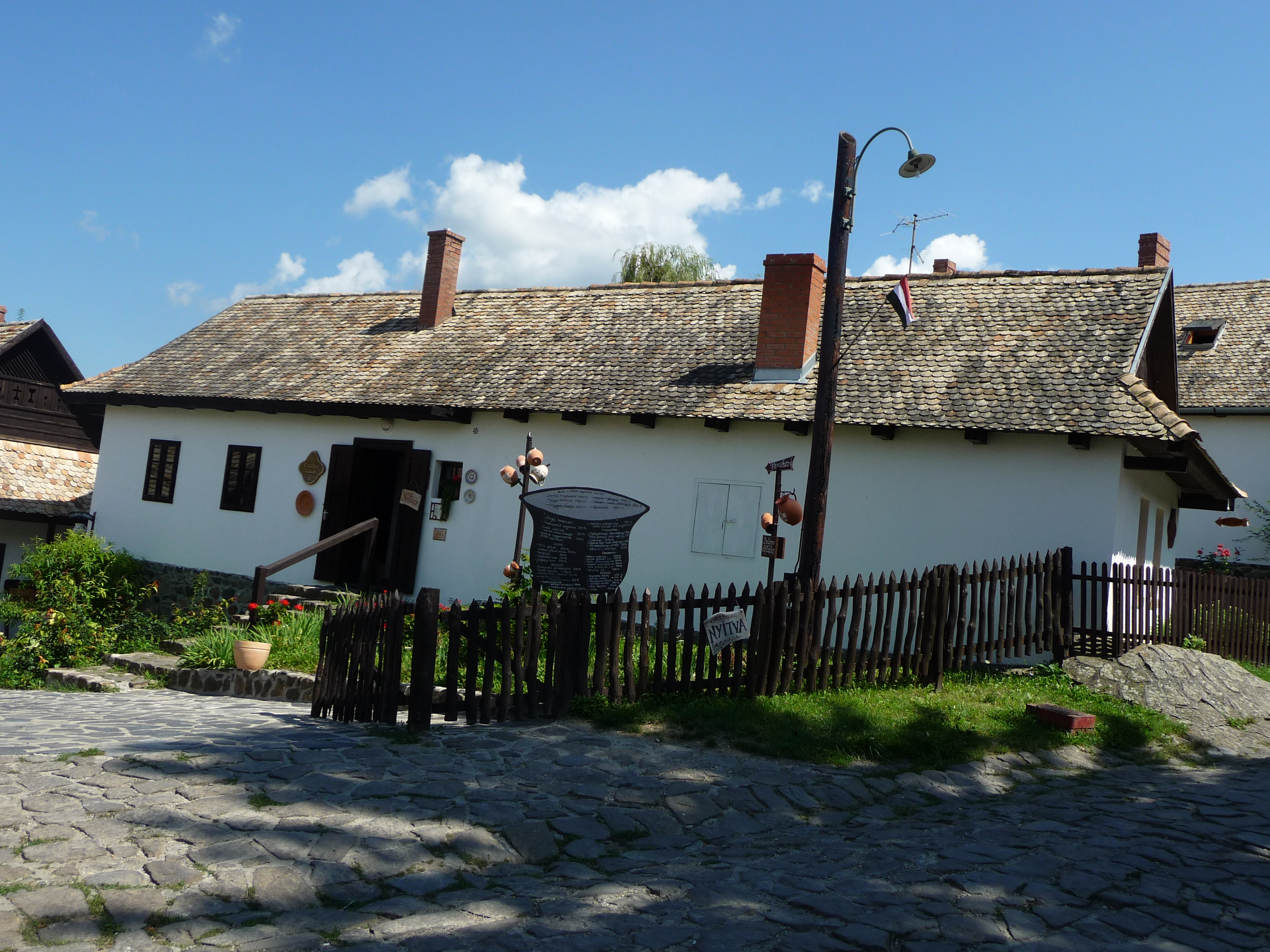 Hollókő, Kossuth L. út 65.